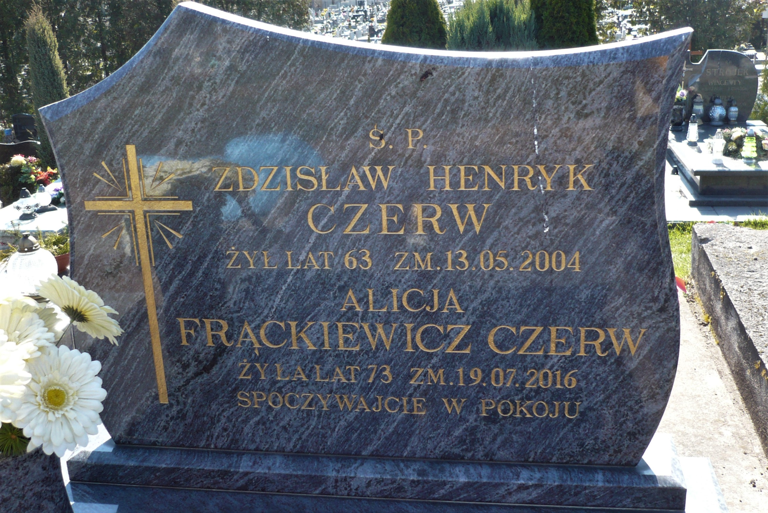 Zdzisław Czerw, pomnik